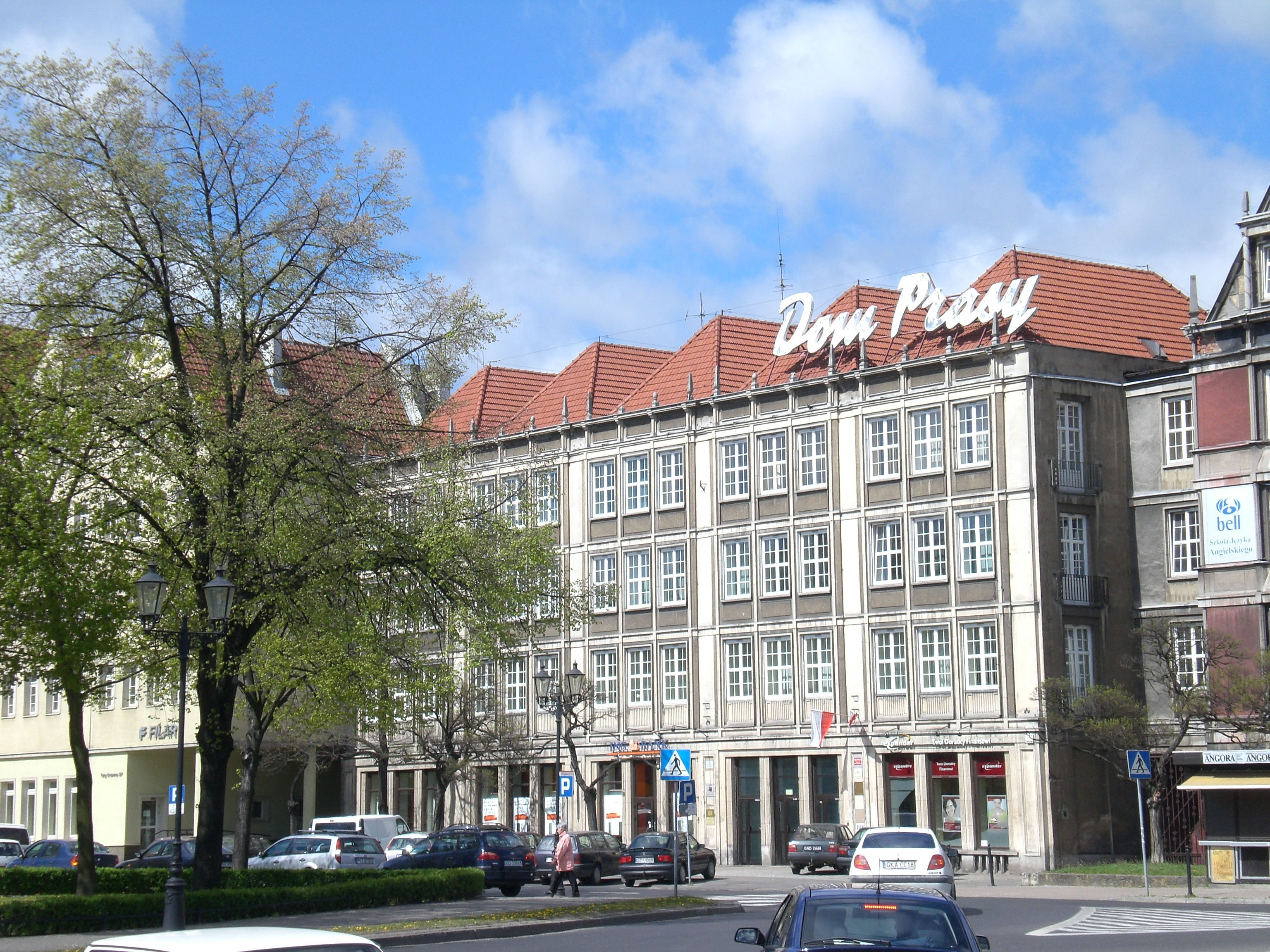 "Dom Prasy" w Gdańsku na Starym Mieście.